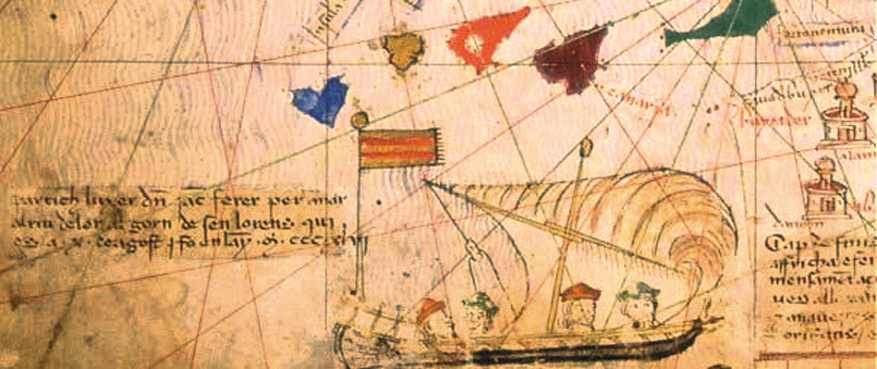 detall del Mapa Cresques de 1375, on es veu el vaixell de Jacme Ferrer.